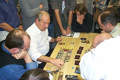 Teuber5